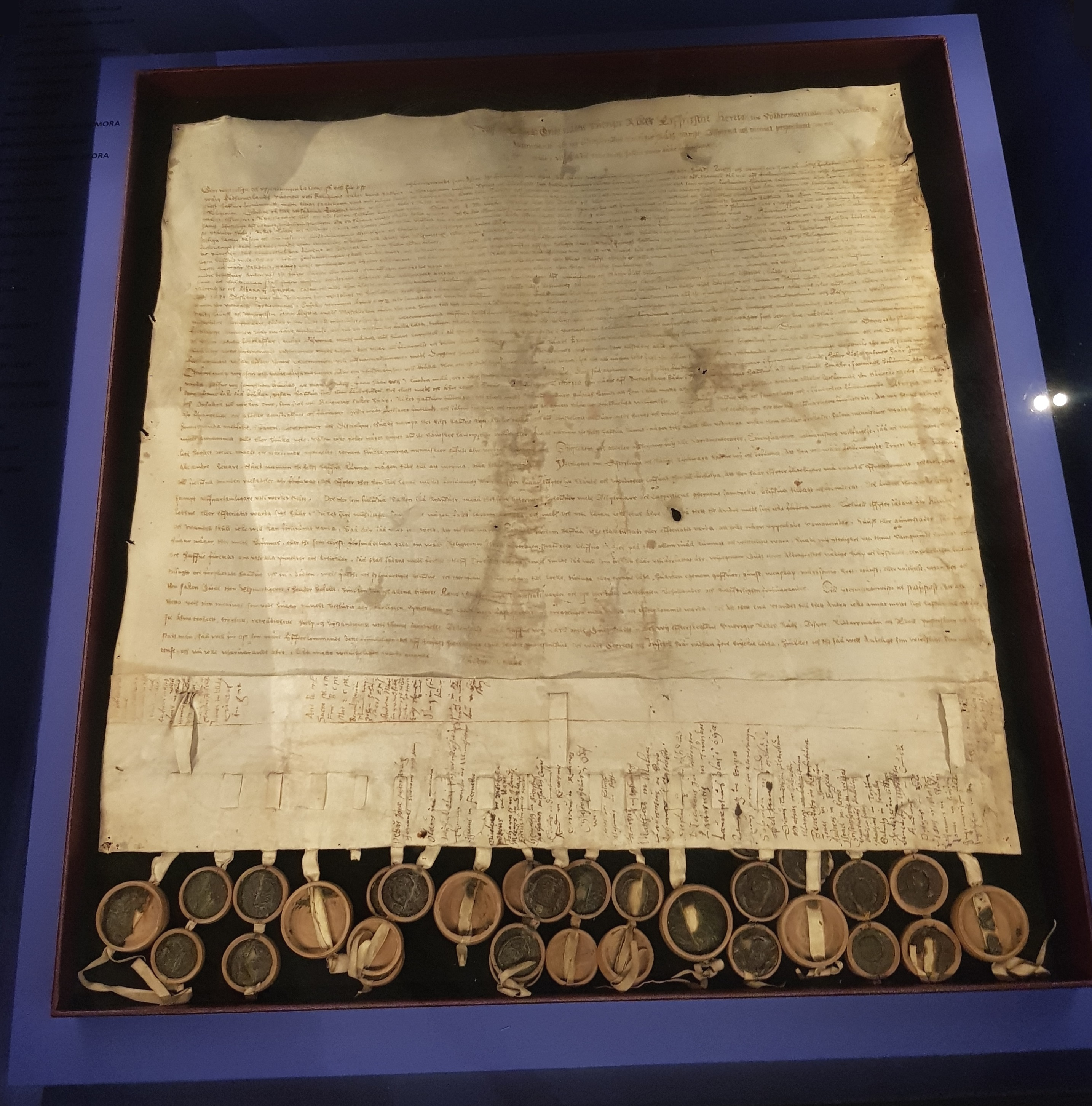 Ett dokument gällande Uppsala möte 1593. Dokumentet från mötet upprättades i flera exemplar och detta exemplar har underskrifter och sigill från en rad präster i Västerås stift. Dokumentet återfinns i Västerås domkyrka.